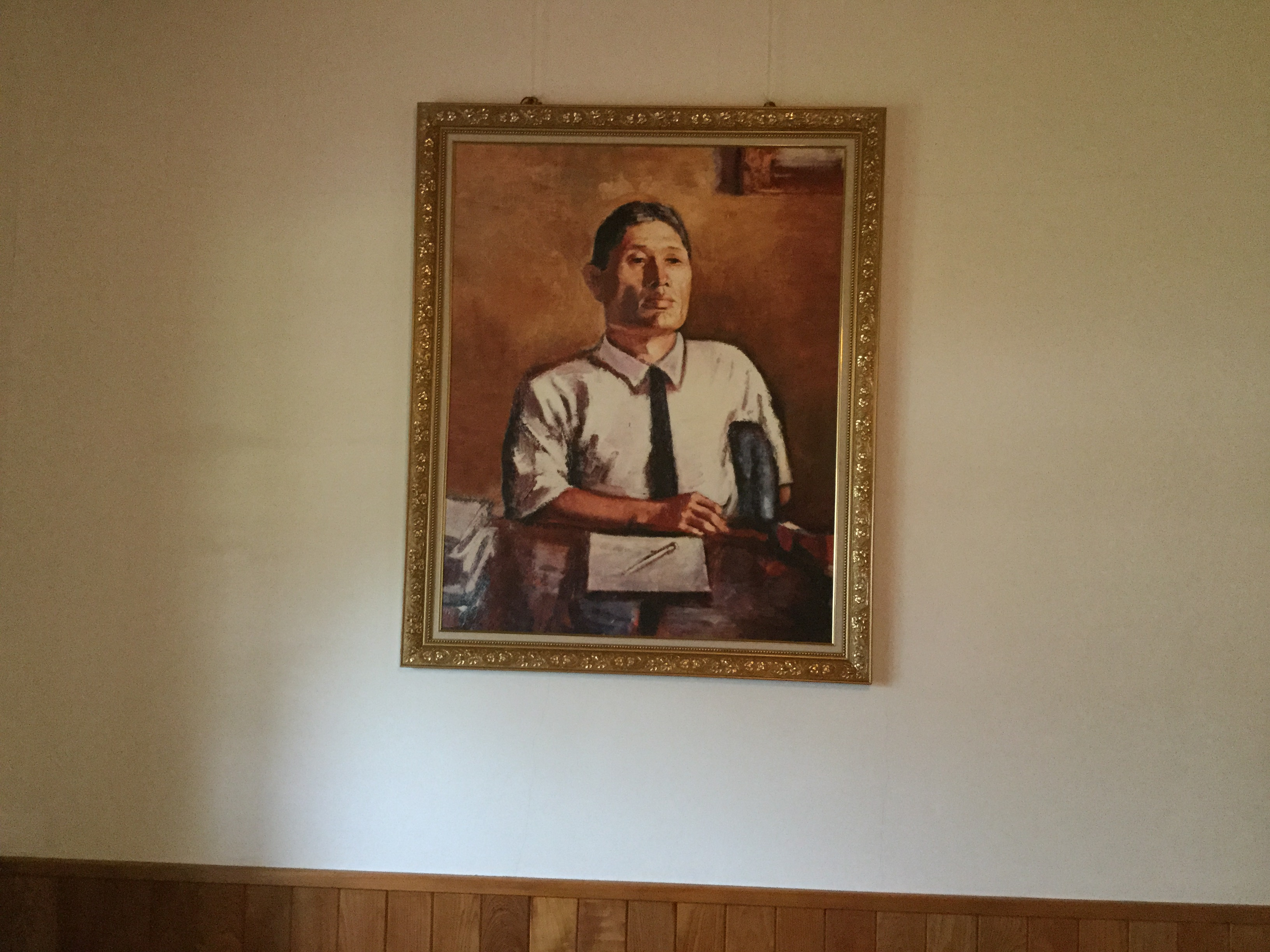 與一的肖像畫於八田與一故居